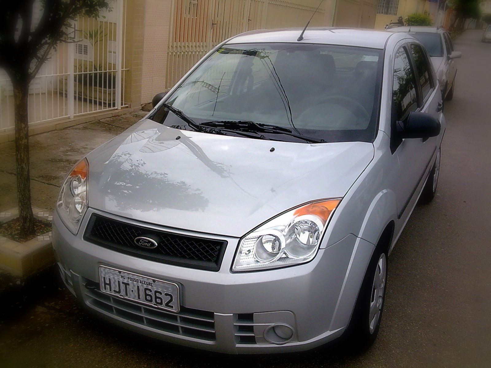 Ford Fiesta 4 Portas 1.0L 8V Flex (2009)